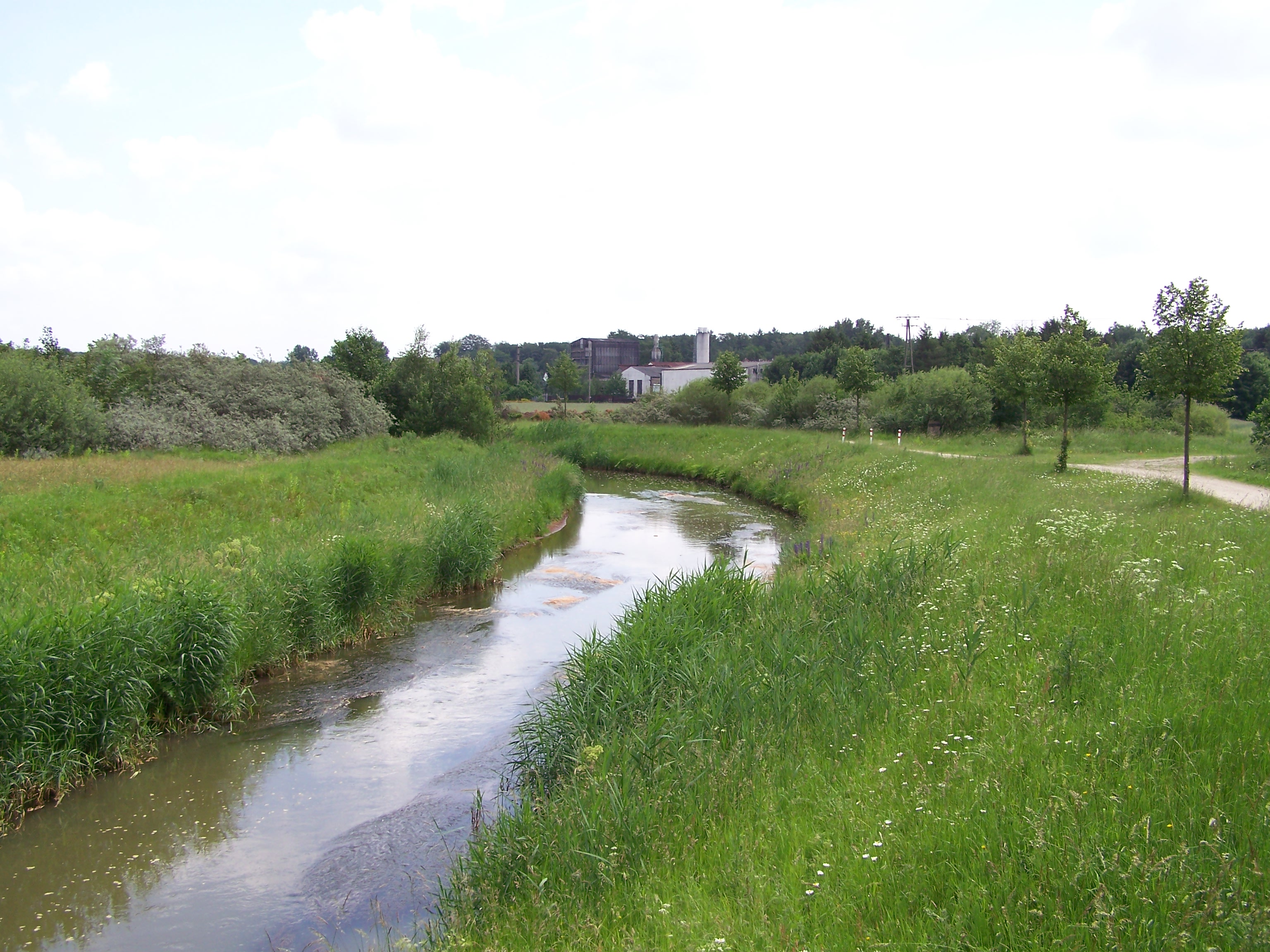 Hörsteler Aa in Gravenhorst. Im Hintergrund die ehemalige Eisenhütte, heute Gießerei.